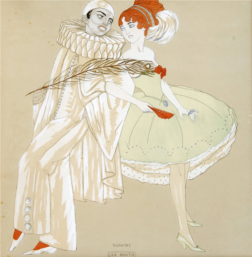 Schwibs.